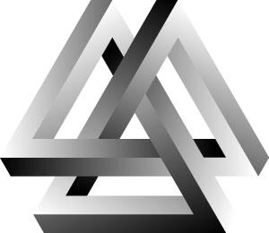 Titre : Trigolos (dessin) Licence : GFDL Source : © Roby Roby